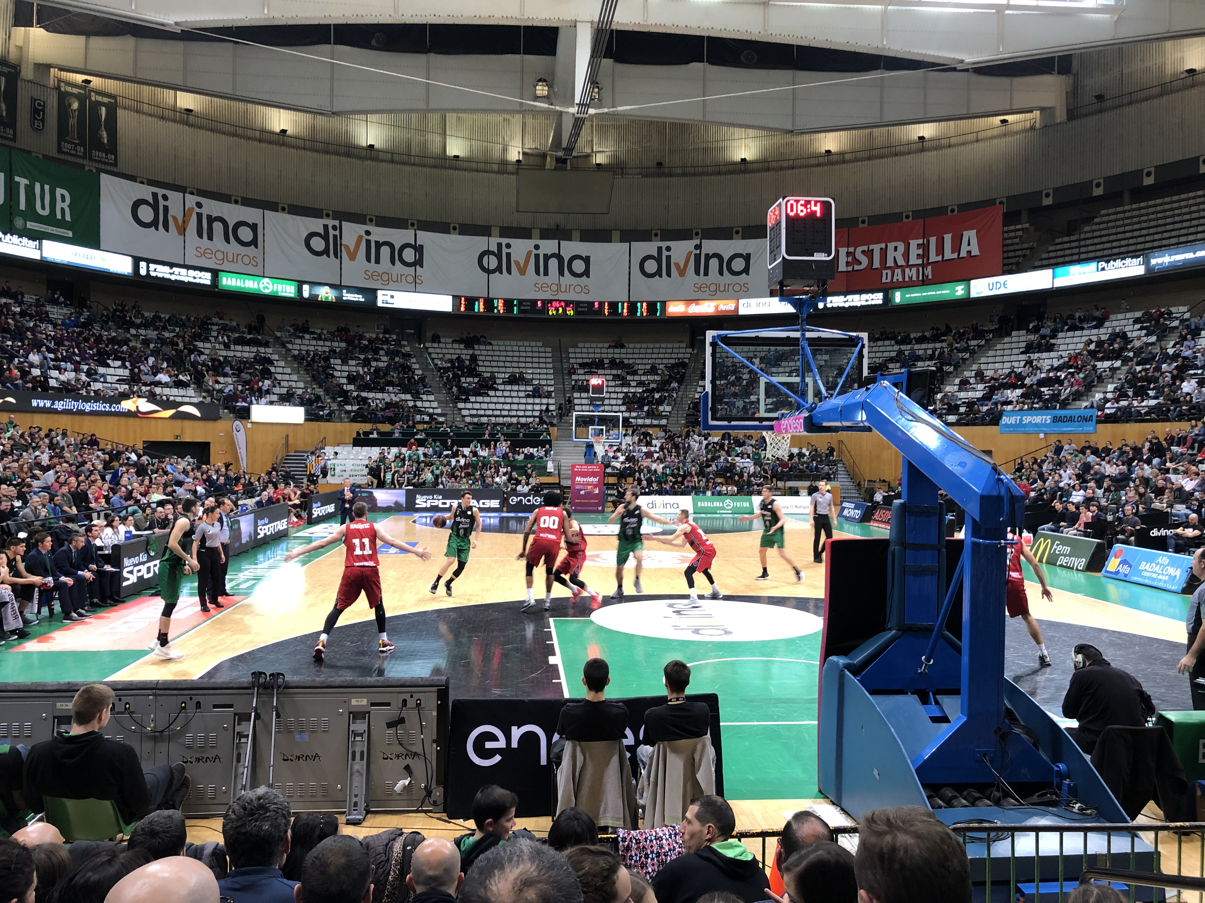 Partit de lliga entre el Divina Seguros Joventut i el Tecnyconta Zaragoza disputat a l'Olímpic de Badalona, de la temporada 2018-19.